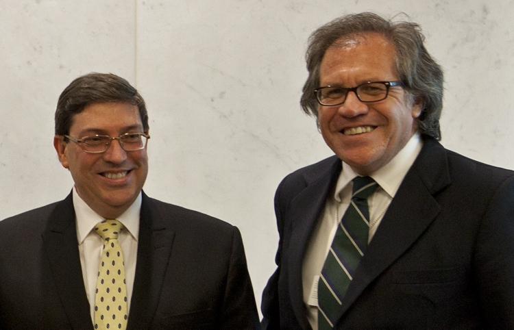 Nueva York, Marzo 26 de 2013. Esta tarde en la sede de las Naciones Unidas, el Canciller argentino, Héctor Timerman, mantuvo una reunión con el Secretario General de la ONU, Ban Ki-Moon, a la que asistió en compañía de los Cancilleres de Uruguay, Luis Almagro (en ejercicio de la presidencia pro témpore [PPT] del MERCOSUR); Cuba, Bruno Rodríguez Parrilla ( PPT CELAC ); y por el Vicecanciller del Perú, José Beraún Aranibar (PPT UNASUR), quienes manifestaron, junto a Timerman, el respaldo de América Latina y el Caribe a los derechos argentinos sobre las Islas Malvinas, Georgias del Sur y Sándwich del Sur y los espacios marítimos circundantes.